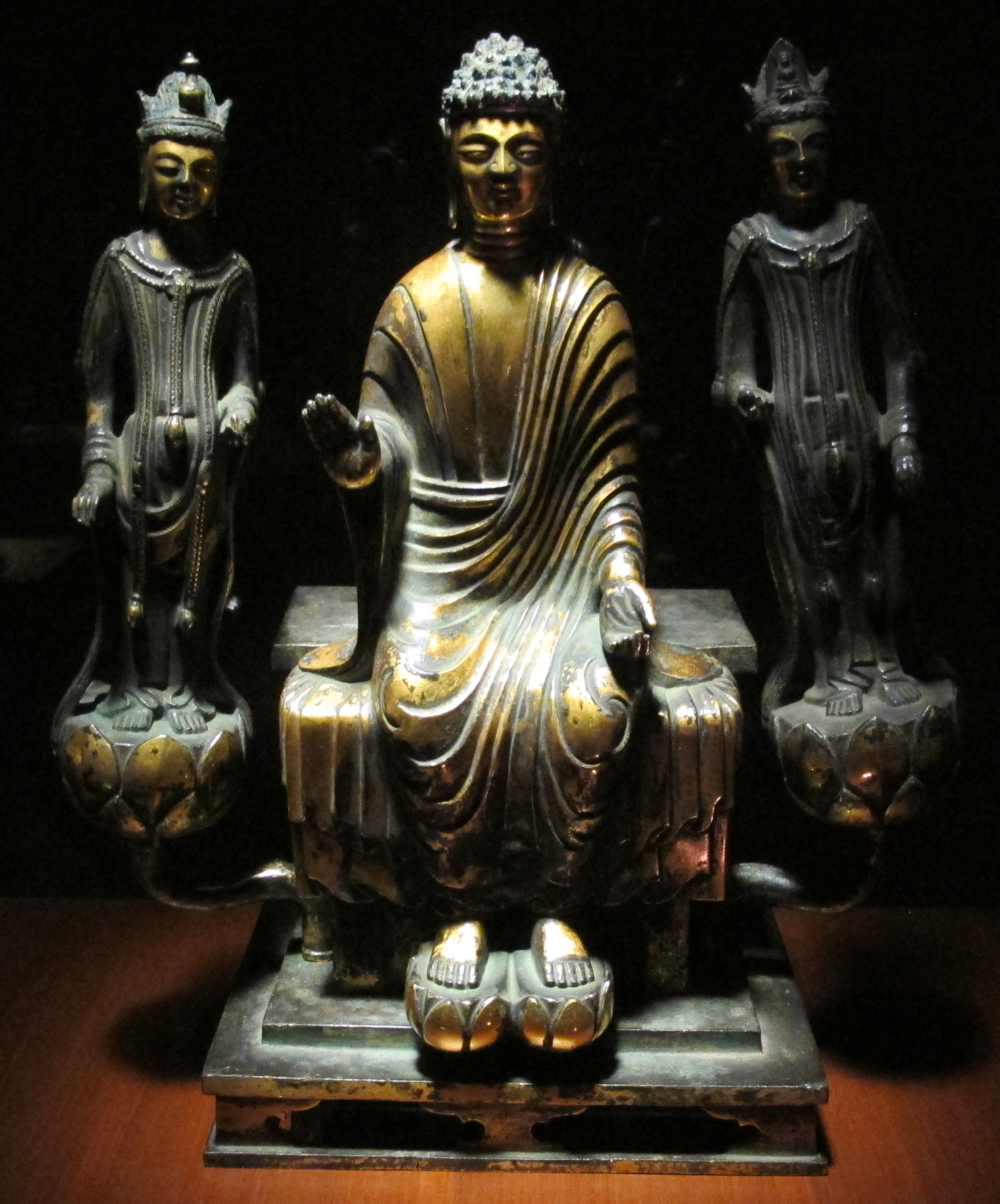 Periodo asuka, amitabha e due assitenti, VII sec